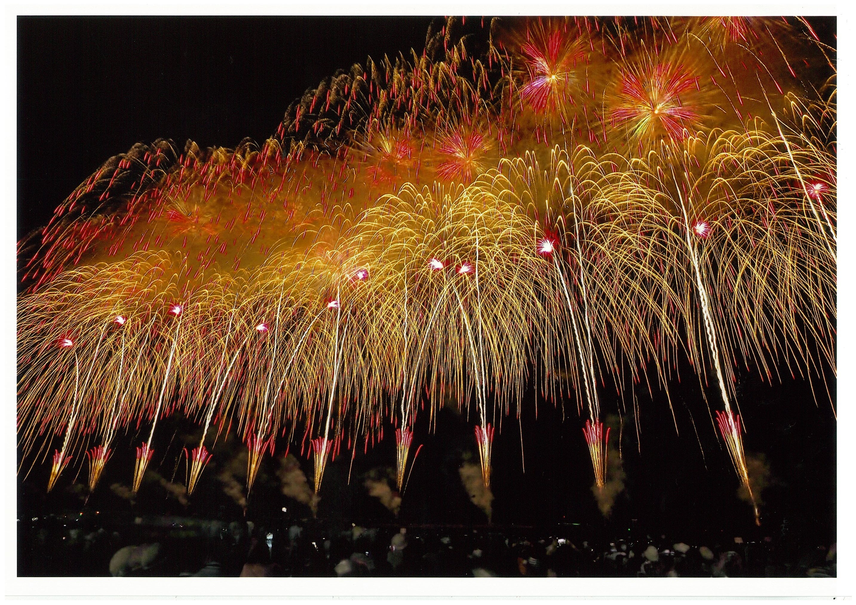 0722能代の花火